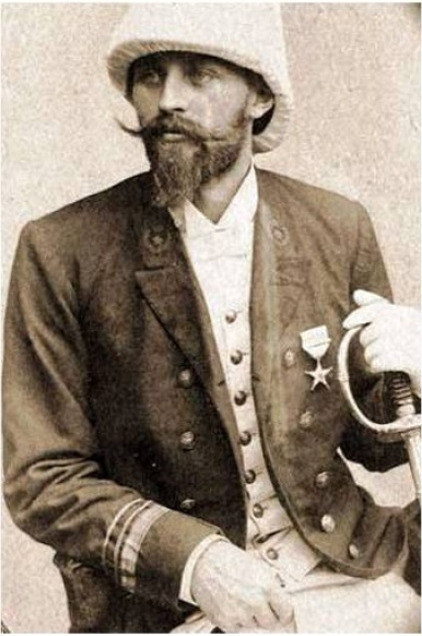 Félix Fuchs als functionaris van Congo Vrijstaat ca. 1888